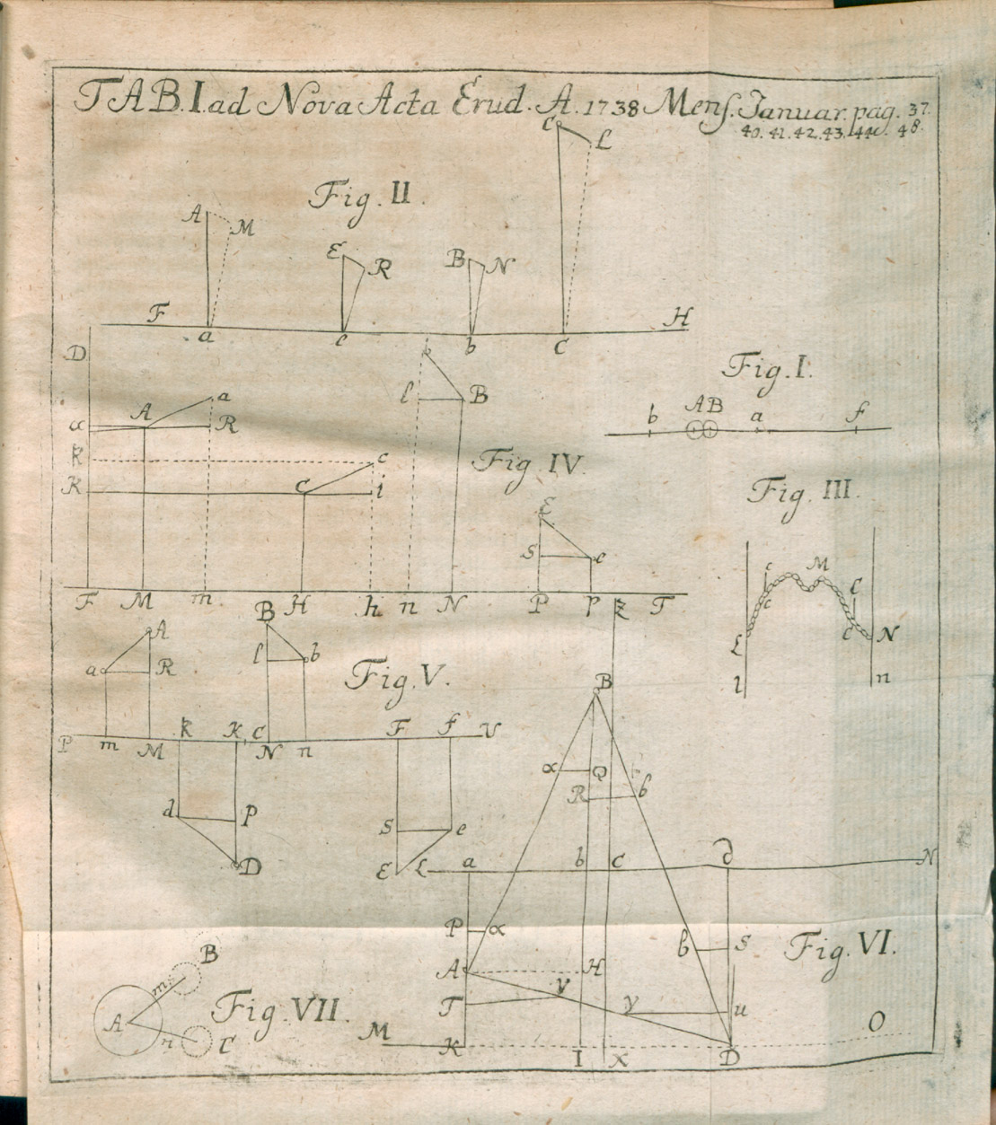 Illustration